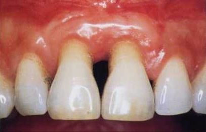 recessions parodontales sur les incisives centrales maxillaire